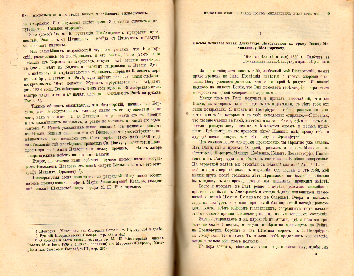 Письмо наследника Александра Николаевича Иосифу Виельгорскому